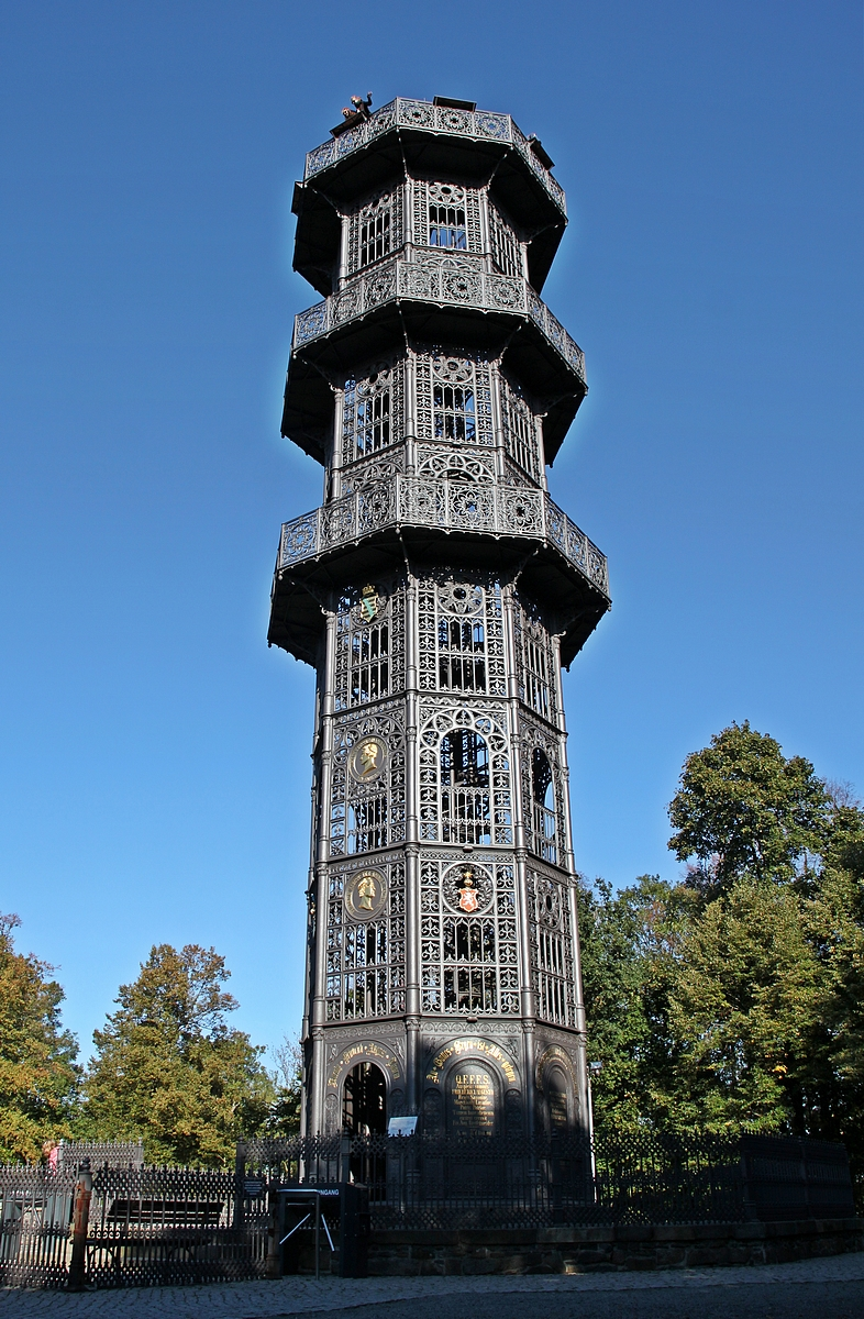 Blick auf den König-Friedrich-August-Turm auf dem Löbauer Berg. Der 28 Meter hohe Turm wurde 1854 aus Gusseisen von der Eisenhütte Bernsdorf (Oberlausitz) gefertigt. Er ist heute der einzige noch erhaltene gusseiserne Aussichtsturm in Europa. Auf Grund seiner exponierten Lage hat man vom Berg eine hervorragende Aussicht über die Bergkette des Zittauer und Lausitzer Gebirges sowie zum Iser- und Riesengebirge.